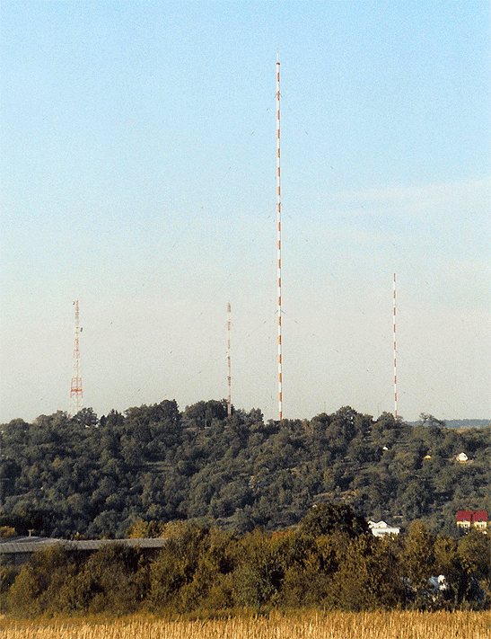 Beschreibung: Sendeanlage Mühlacker am 18.09.2004 (Blick von Süden über das Enztal) Fotograf: --SteveK 22:32, 14. Nov 2004 (CET) Lizenz